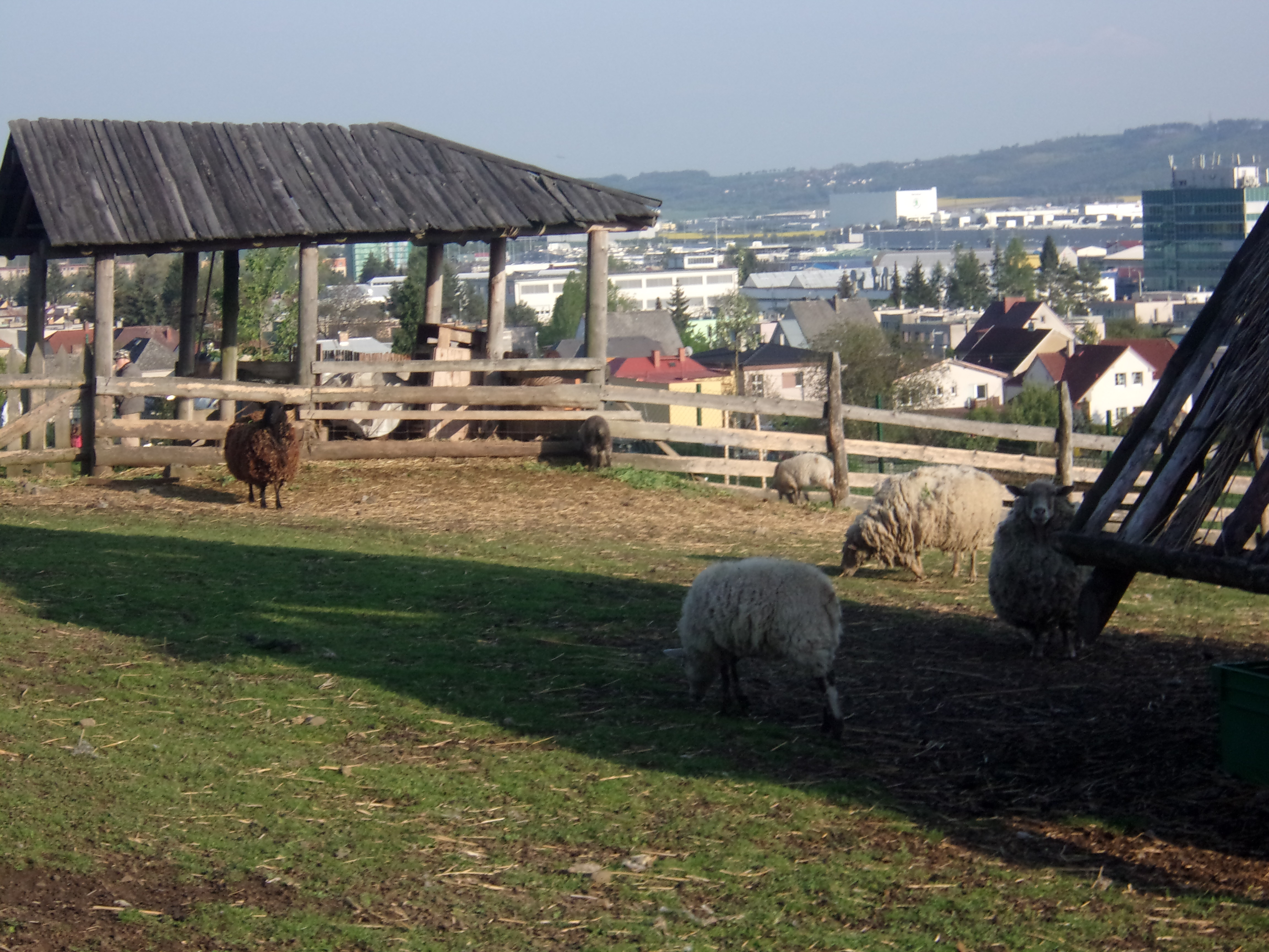 výhled na Boleslav